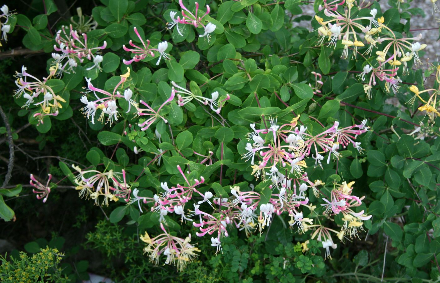 Lonicera etrusca, Geißblattgewächse (Caprifoliaceae) - Italien/Italia/Italy: Friuli-Venezia Giulia, Prov. Trieste, Rilkeweg/Sentiero Rilke von Sistiana nach Duino